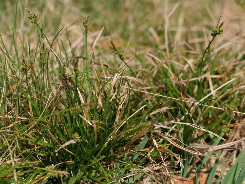 Pillen-Segge (Carex pilulifera), Habitus